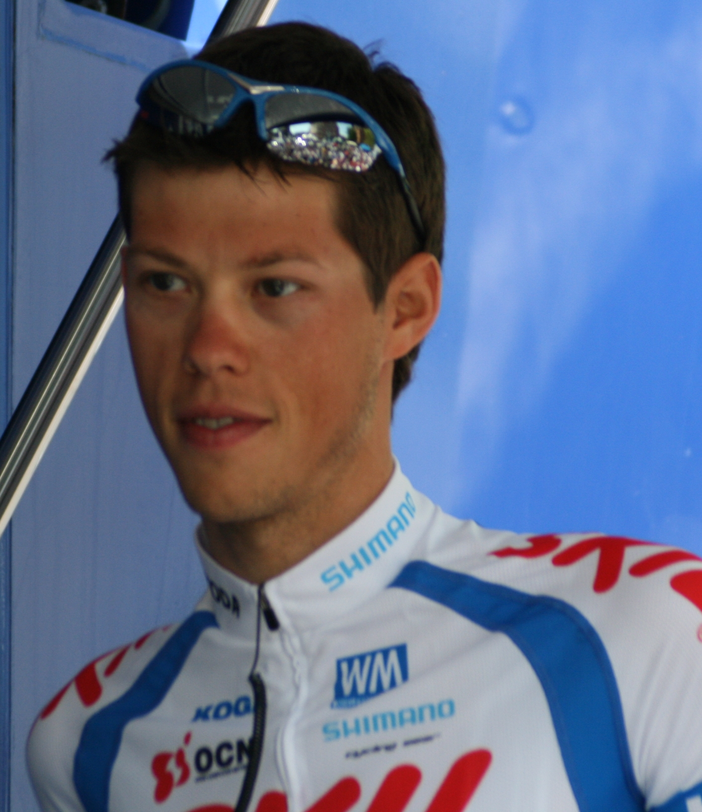 Piet Rooijakkers aux Quatre jours de Dunkerque 2008